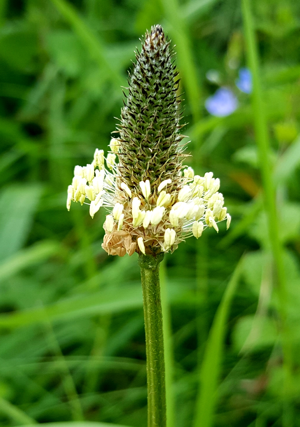 plantain ertainaren lorea